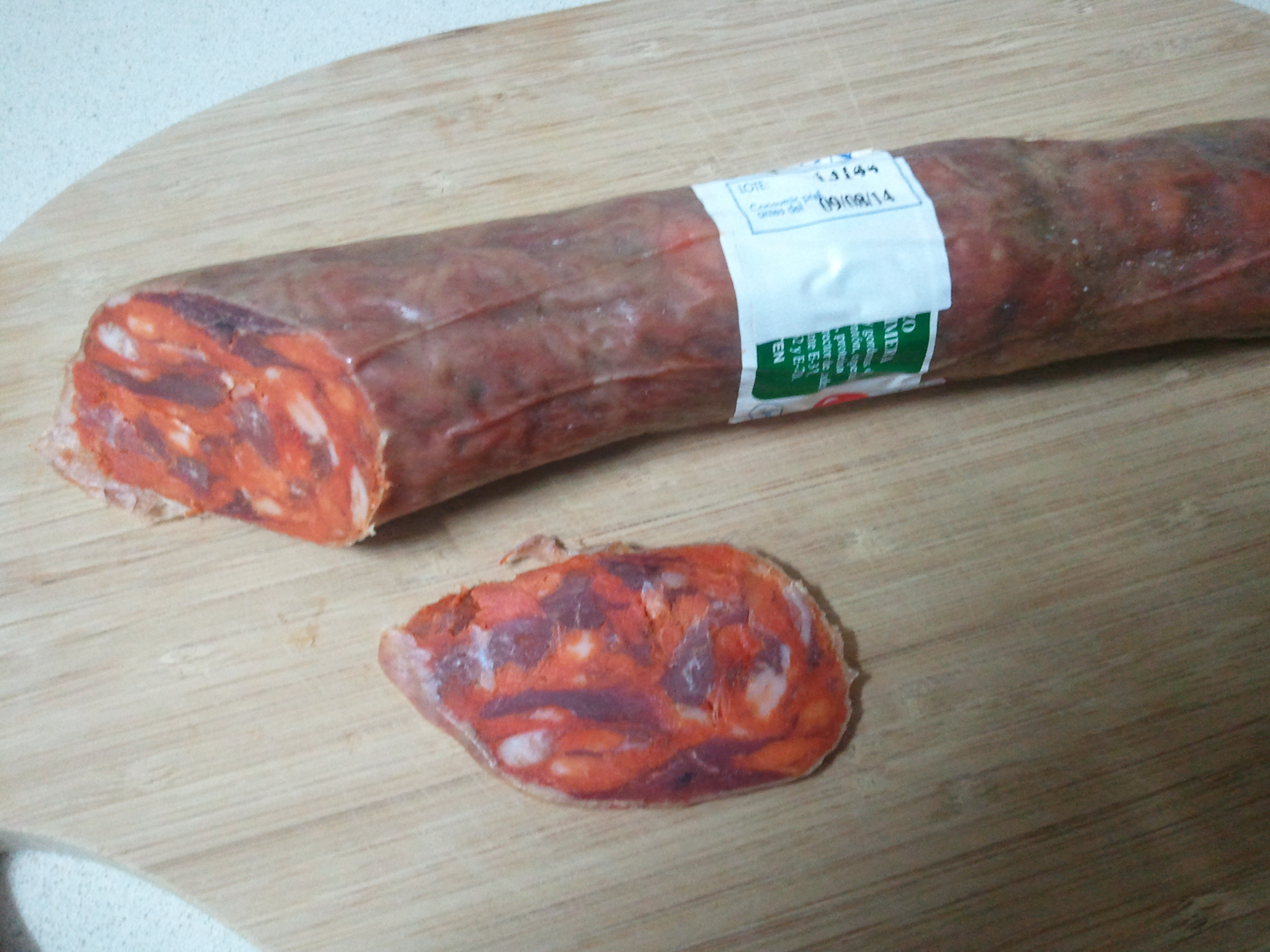 Chorizo cular, Roal, La Torre, Ávila, España.